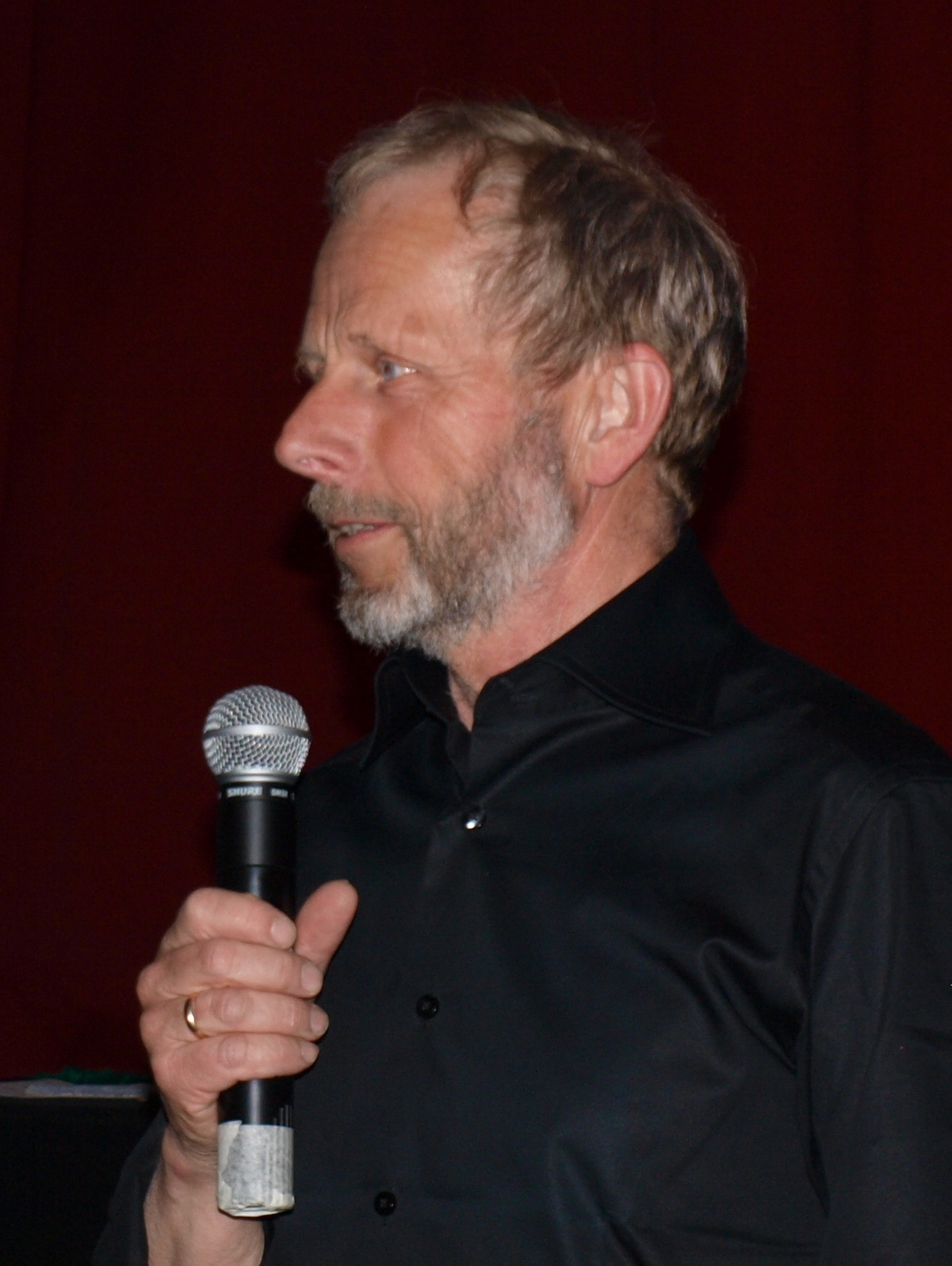 Reidar Olsen (f.1945), mangeårig rektor på Veien skole i Hønefoss, fram til utgangen av 2010.